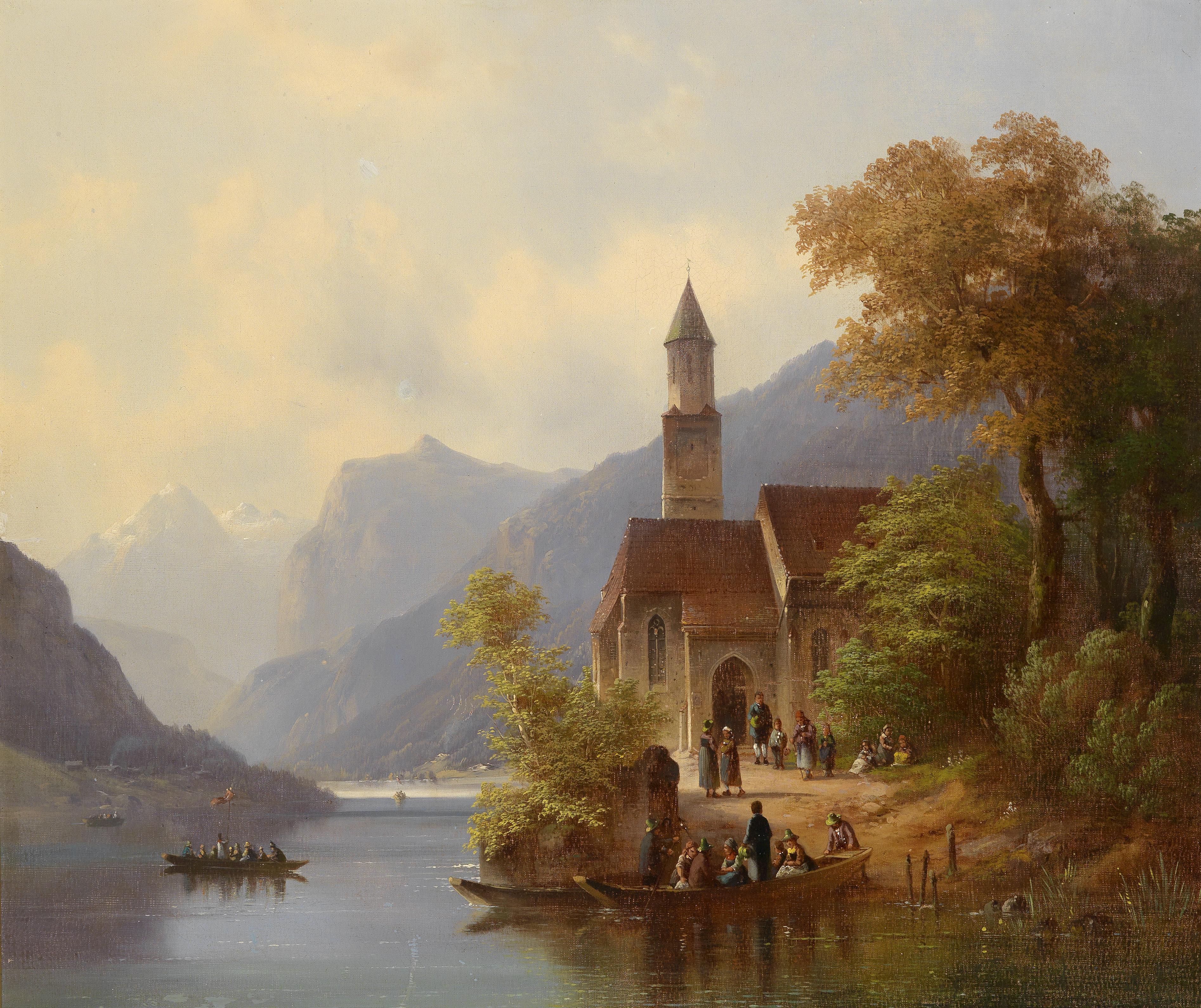 Am Heimweg von der Sonntagsmessetitle QS:P1476,de:"Am Heimweg von der Sonntagsmesse" label QS:Lde,"Am Heimweg von der Sonntagsmesse"